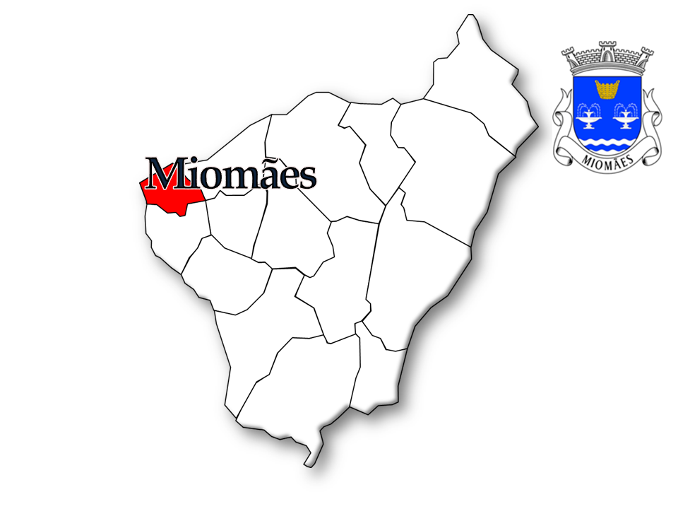 Mapa das freguesias